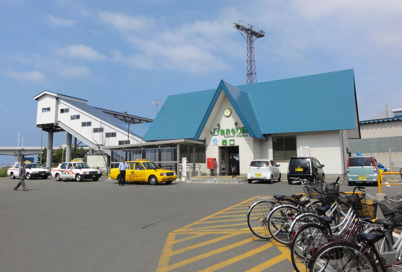 青森駅西口